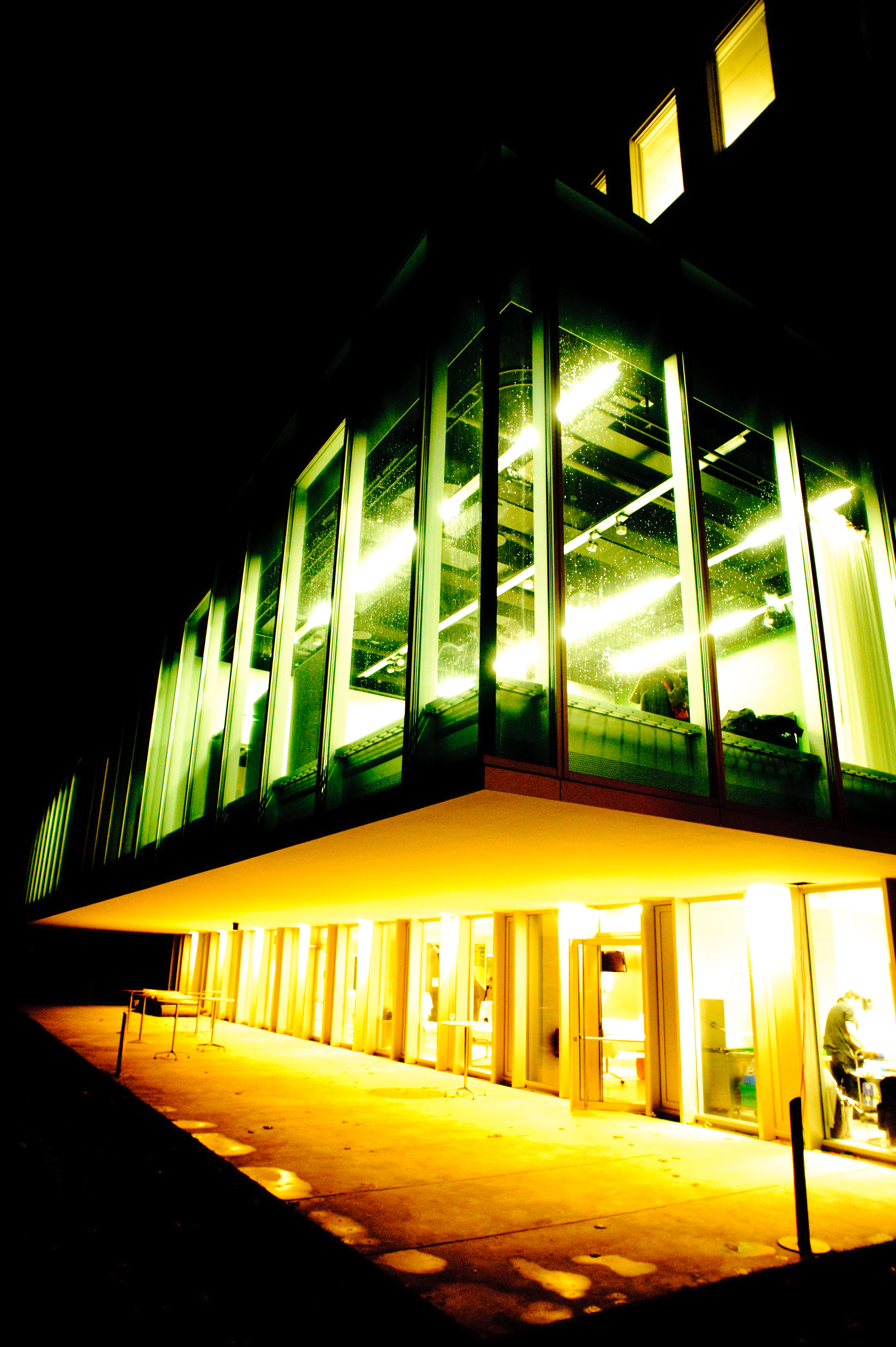 Fotos: Stephan Röhl Heinrich-Böll-Stiftung, Berlin Enteignung oder Infotopia? Google Books und die Zukunft des Wissens Google will der Menschheit mit seinem Buchprogramm Millionen von Büchern zugänglich machen - auch Bücher, die vergriffen sind oder deren Urheberrechtsschutz abgelaufen ist. Nie war die Verheißung des „Wissens für alle" so groß. Und nie war die Gefahr größer, einem Quasi-Monopolisten zu überlassen, was die Aufgabe öffentlicher Daseinsvorsorge sein sollte. Was steckt hinter dem Google-Books-Settlement? Was bedeutet es für Leser, Bibliotheken und Urheber? Im Oktober soll ein US-Gericht über die Zukunft der Bücher entscheiden. Wird es, darf es das auch für deutsche Leser, Autoren und Verlage tun? Selten war die Lage unübersichtlicher - und wohl nie zuvor war ein einzelnes Verfahren wichtiger für die Zukunft des Zugangs zu Wissen als dieses. Eine Veranstaltung von Heinrich-Böll-Stiftung, Goethe-Institut und . Fr, 2.10.09